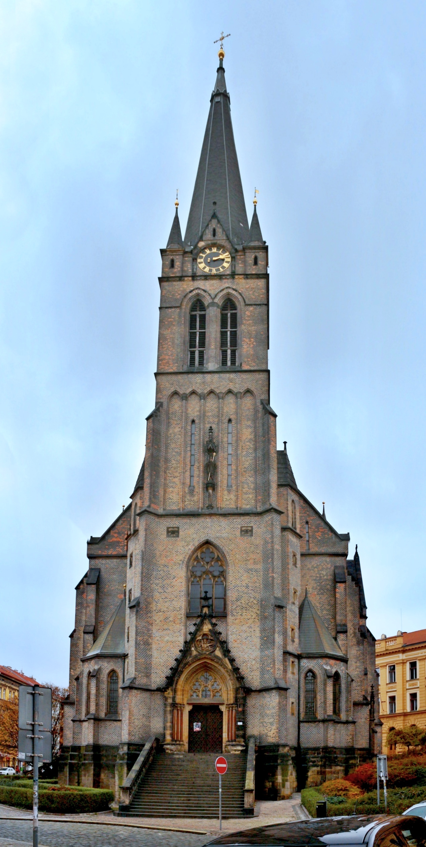 Žižkov nám. Sladkovského